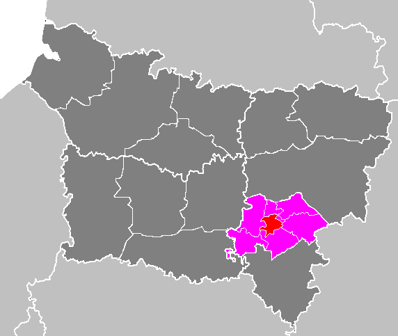 Maps of arrondissements and cantons of France: Arrondissement de Soissons - Canton de Soissons-Sud.PNG